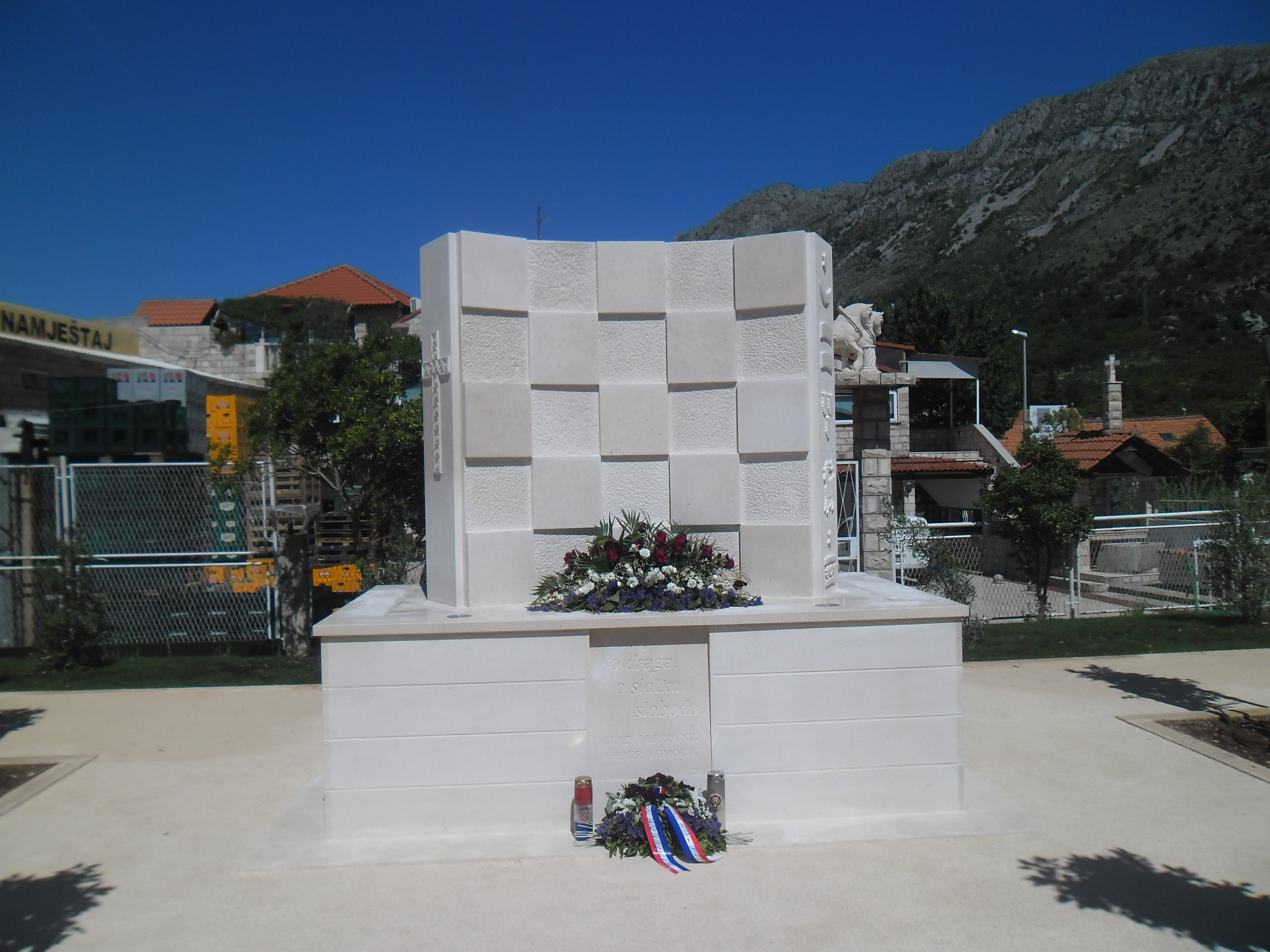 spomenik hrvatskim braniteljima u Komolcu, otkriven povodom 25. obljetnice oslobođenja dubrovačkog kraja (26. svibnja 2017.)